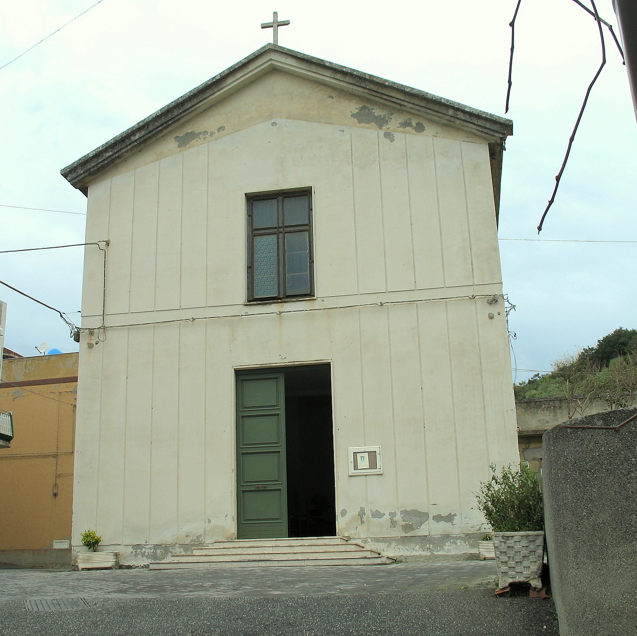 Chiesa San Gaetano, frazione Santa Domenica, Rometta (MS)